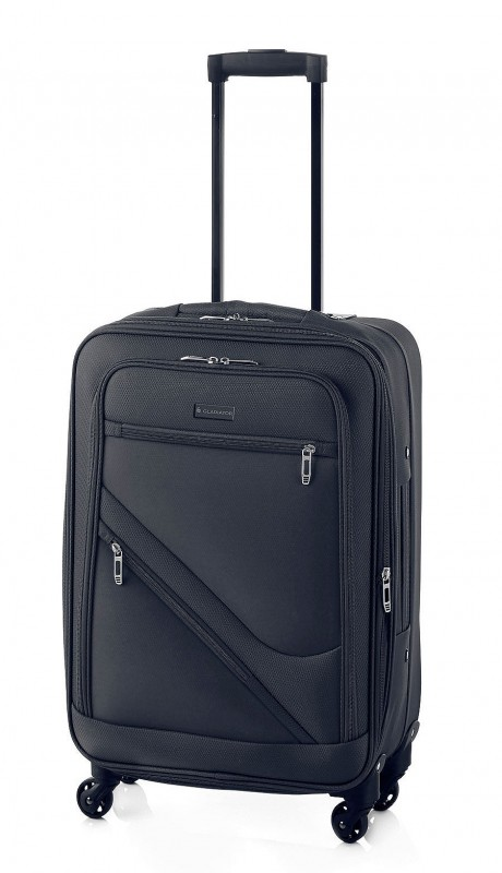 Palubní kufr je využívanější alternativou k palubnímu batohu. U většiny leteckých společností je také uznávaným palubním zavazadlem.